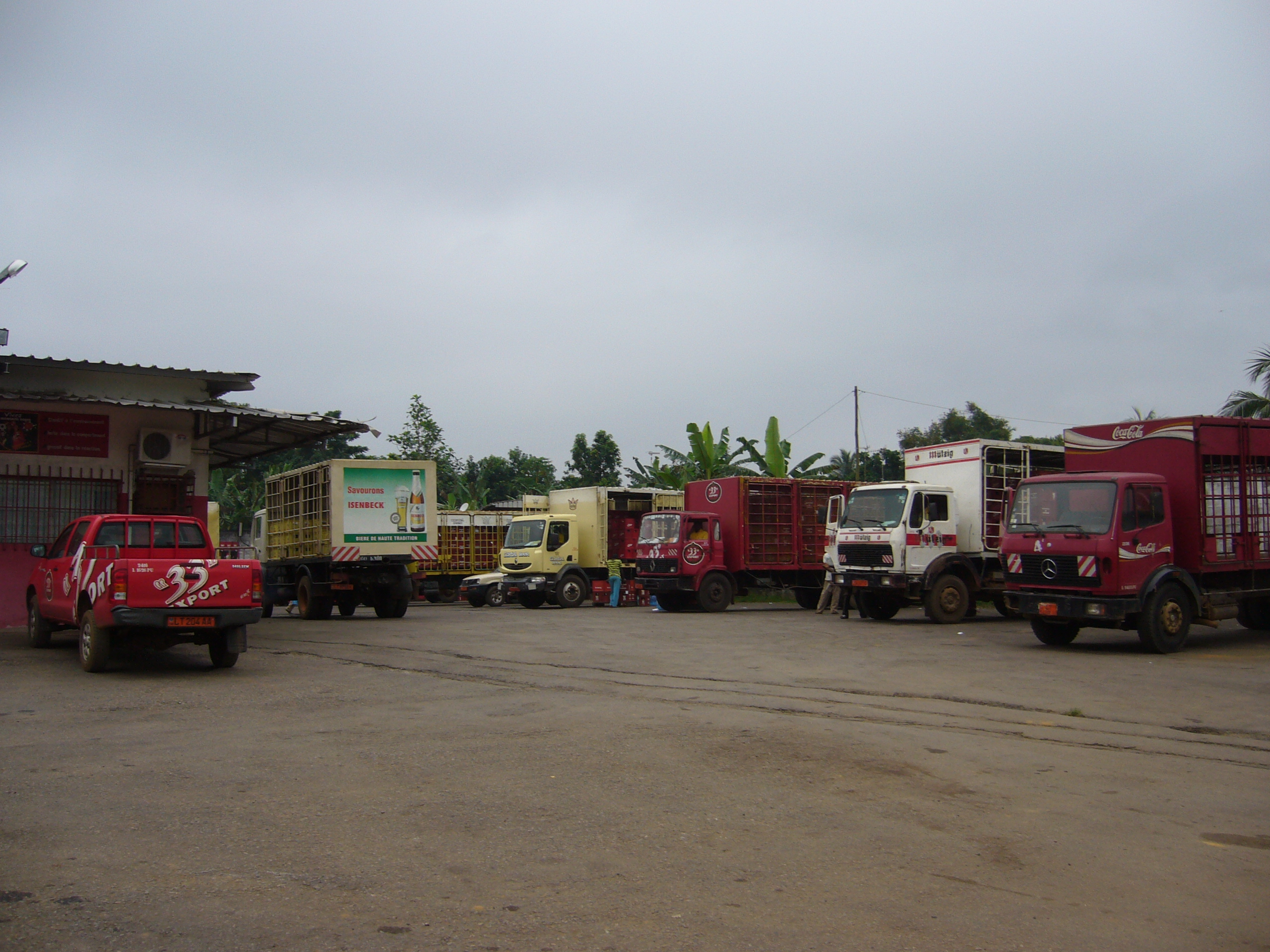 Cameroun - Edéa - Camions de transport de bière au dépôt This is an image with the theme "Africa on the Move or Transport" from: Cameroon